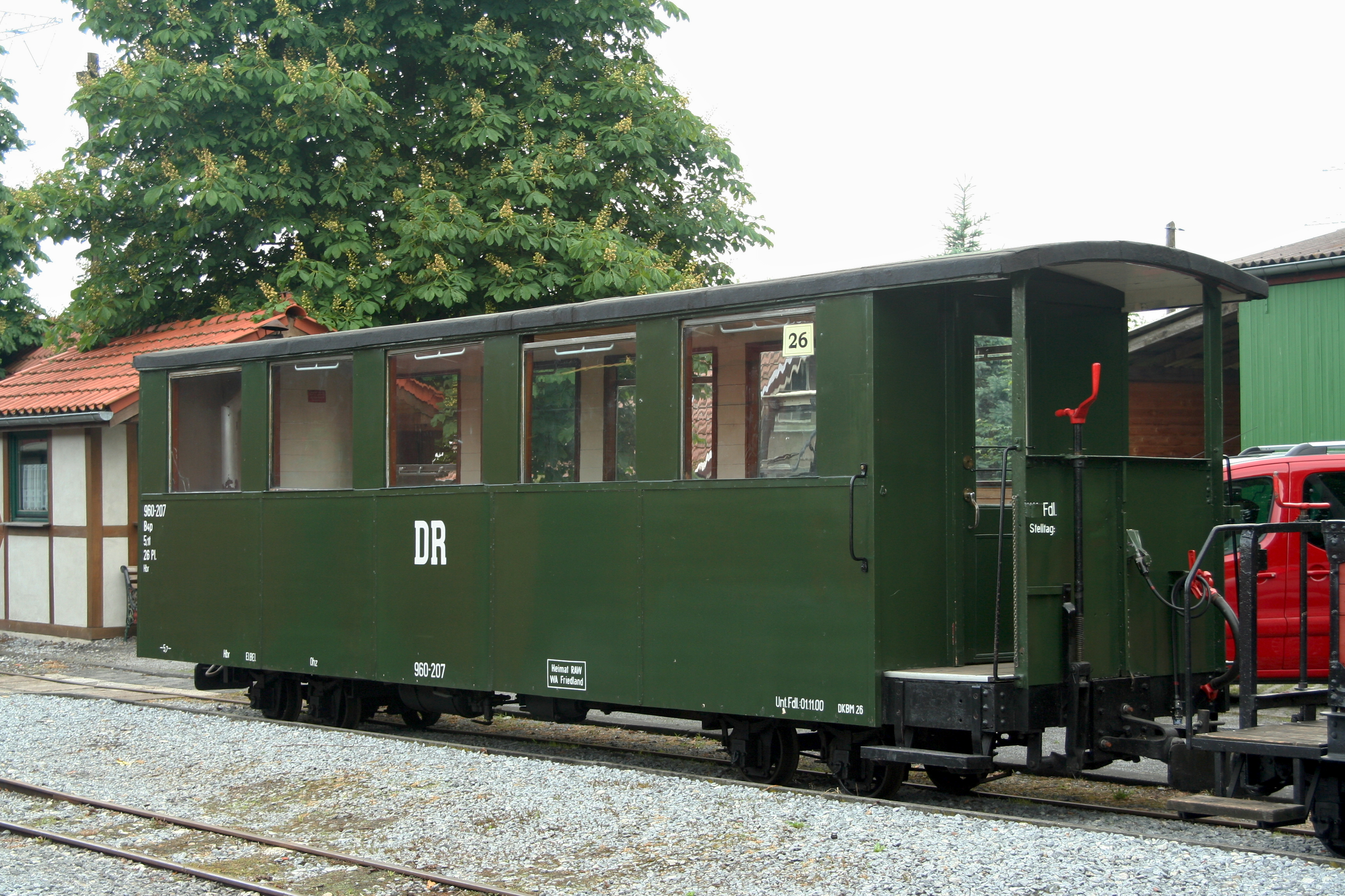 Reisezugwagen 26 der DKBM als 960-207 der DR (ex PE Berlin 6.201 ex DR 960-207 ex DR 6.043 ex MPSB 43) Gattung B4p Glässing & Schollwer 1911 bei der Dampf-Kleinbahn Mühlenstroth am 06.Juni 2012